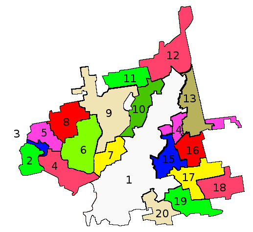 Gemeindegliederung Rajon Krywyj Rih in der Oblast Dnepropetrowsk, UkraineРусиньскый: Криворізський район